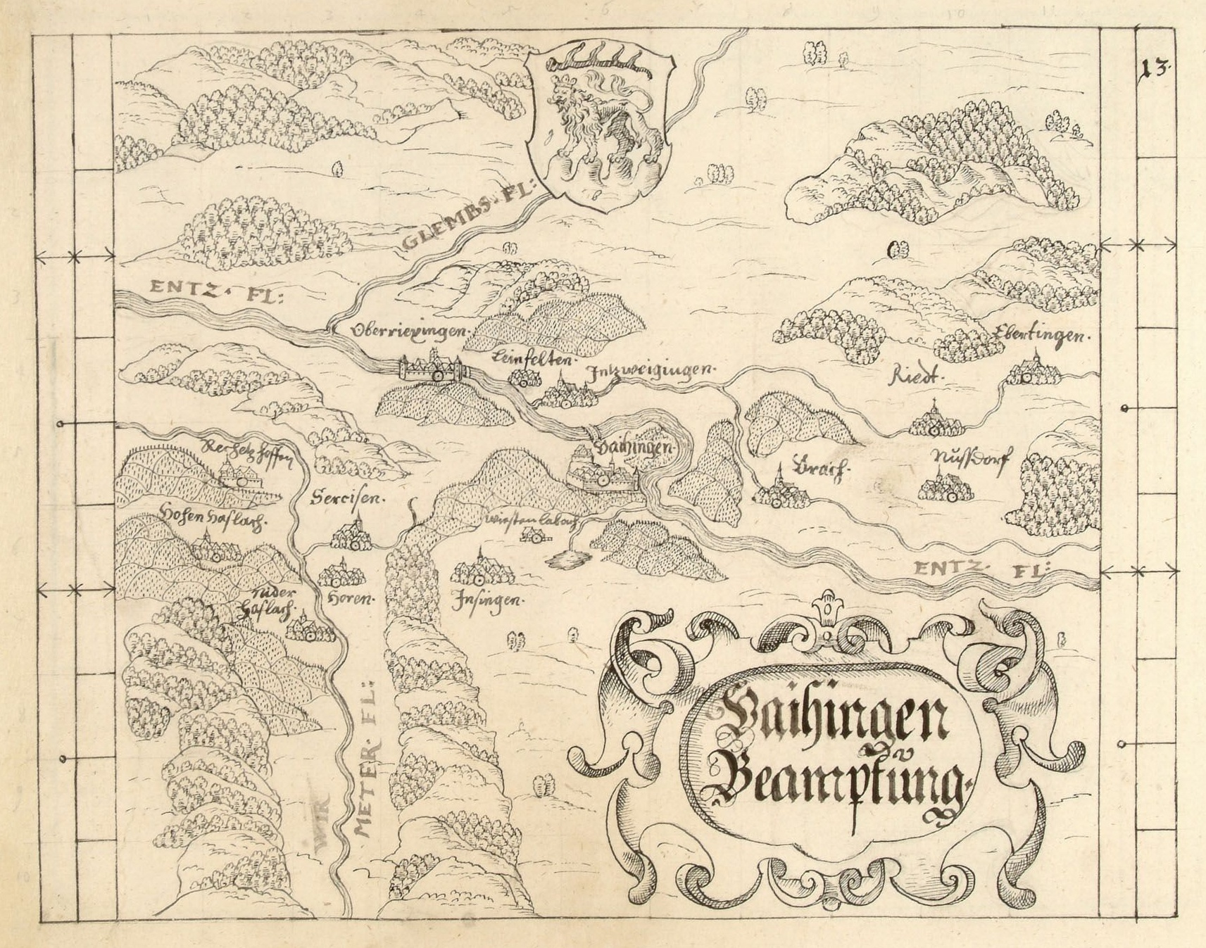 Karte der Vaihinger Beamptung aus der Beschreibung des Hertzogtums W(ürttemberg) ob der Staig und under der Staig, Blatt 15